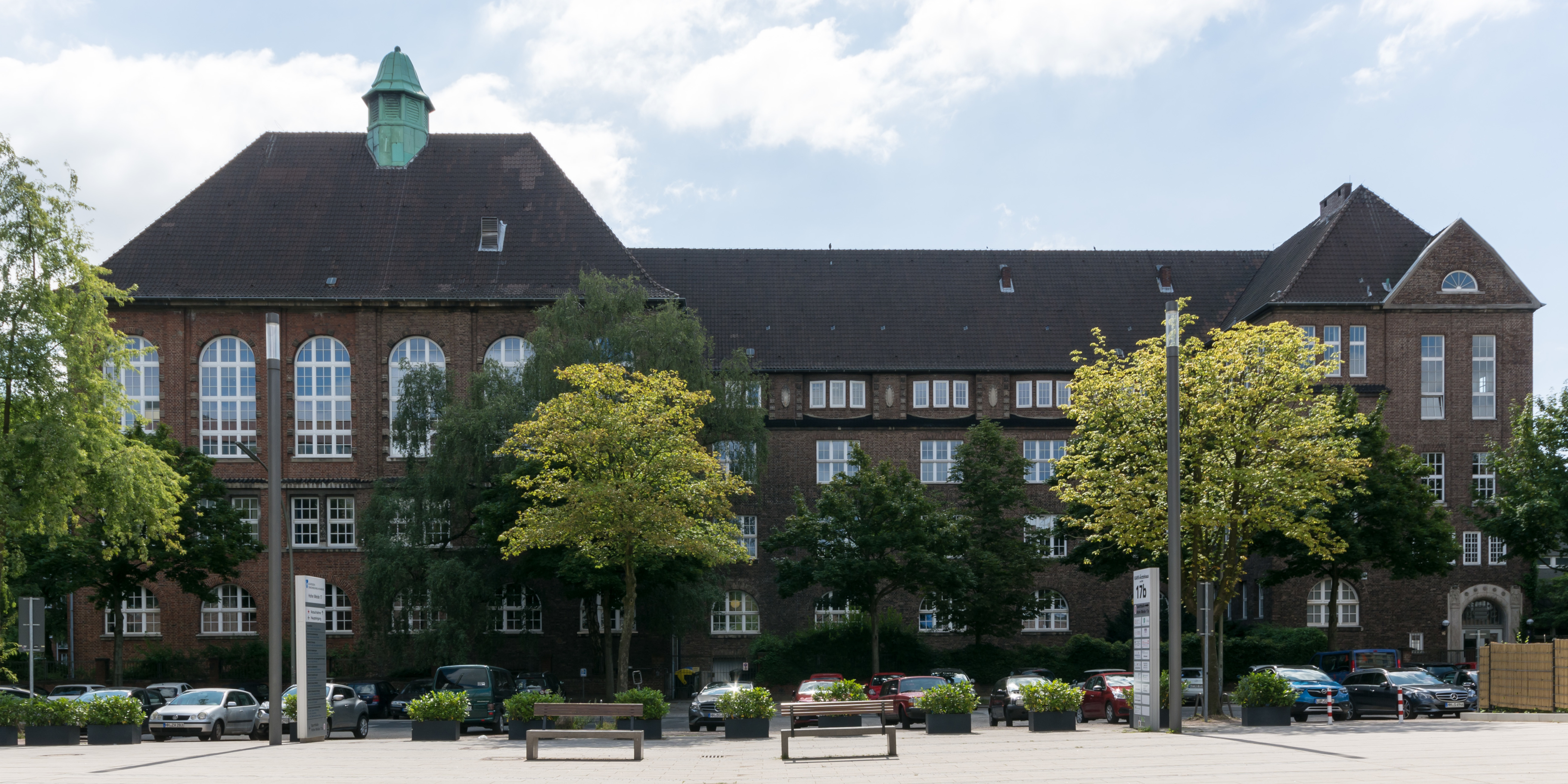 Ehemaliges Lehrerinnenseminar Hohe Weide in Hamburg-Eimsbüttel, heute Landesinstitut für Lehrerbildung. This is a photograph of an architectural monument.